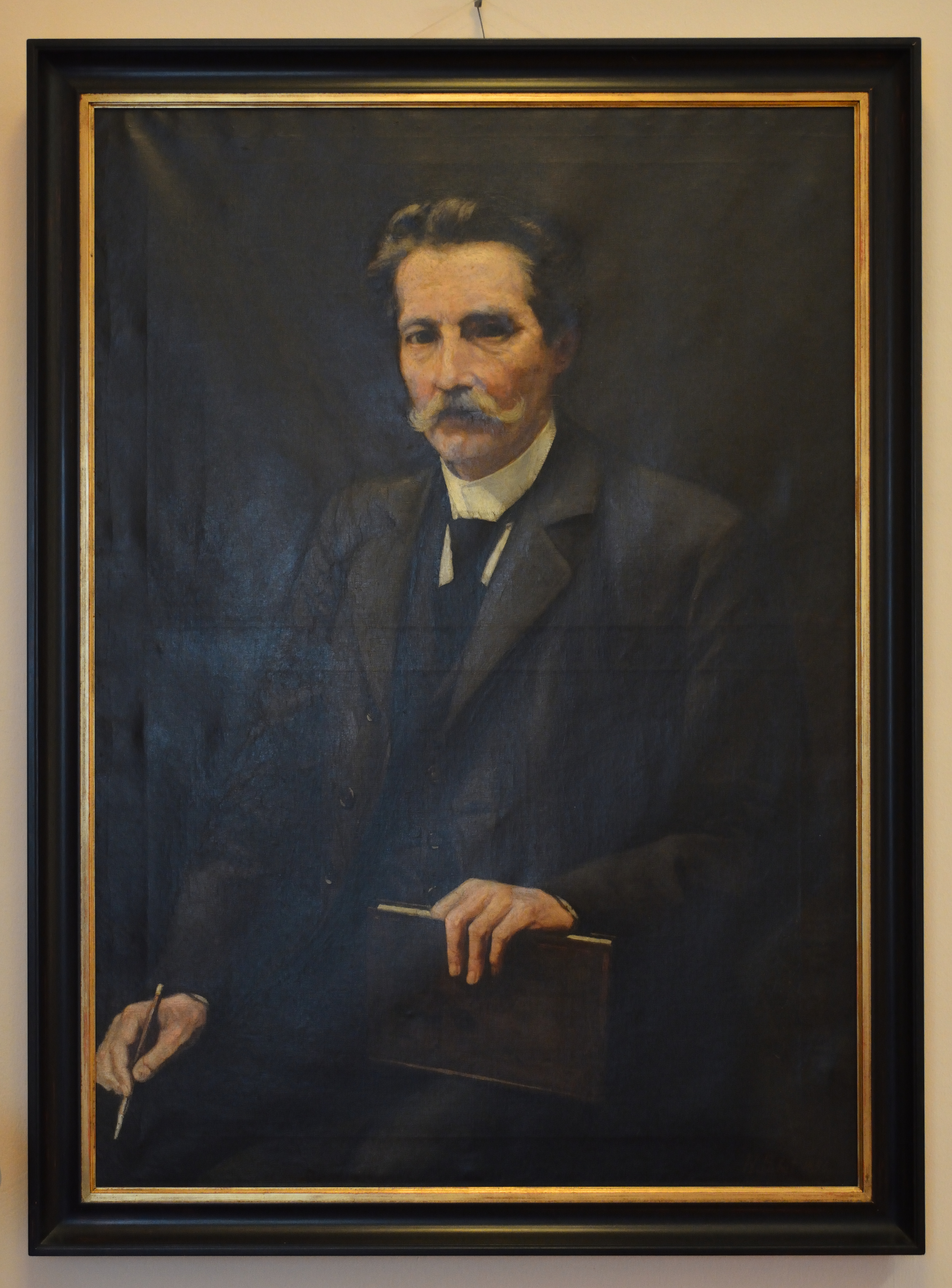 Impressionen des Museumsfestes 2016 im Prinzeßhof, dem Kreismuseum des Kreises Steinburg. Bild von Johann Hinrich Fehrs